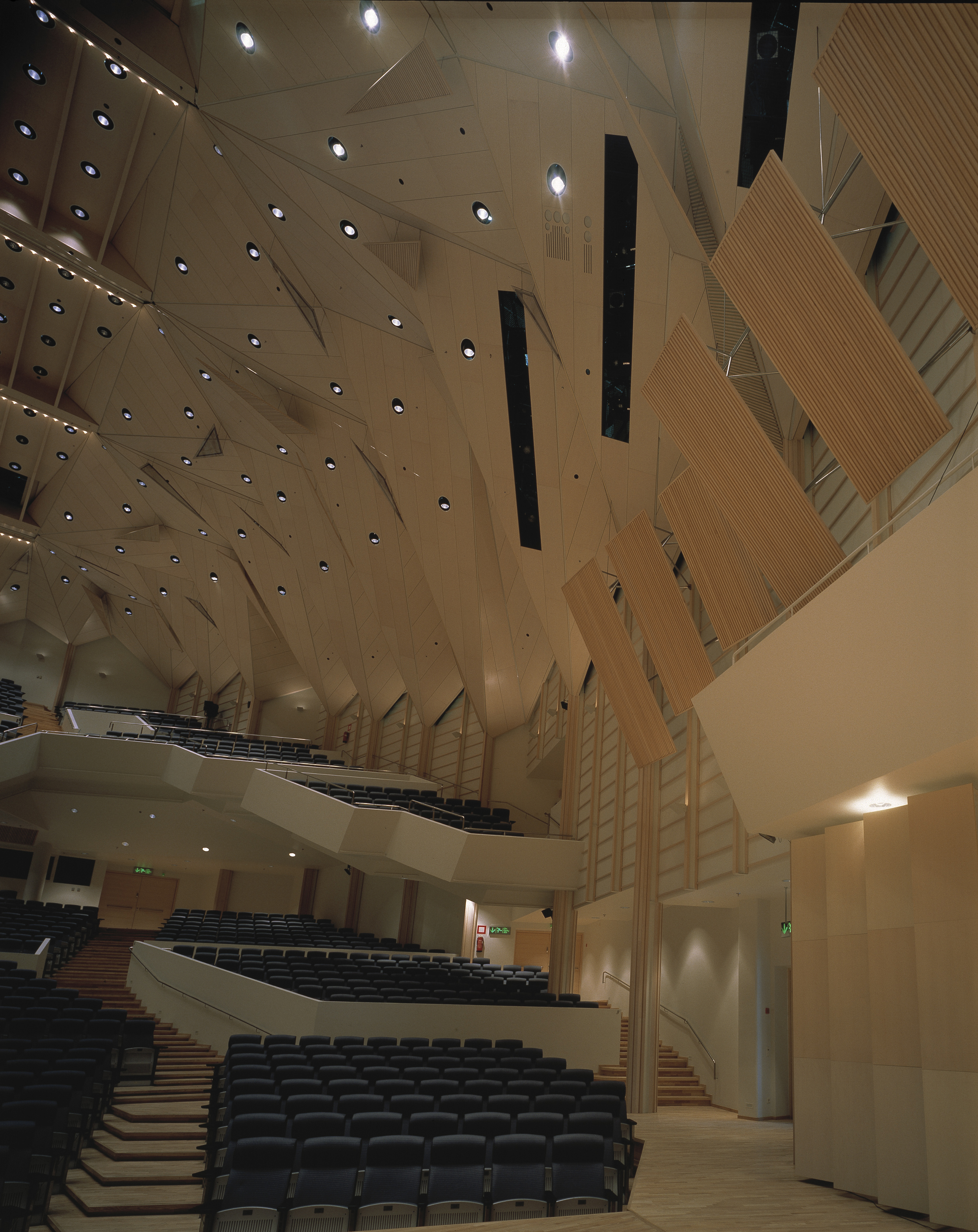 Tampere-talo Iso sali